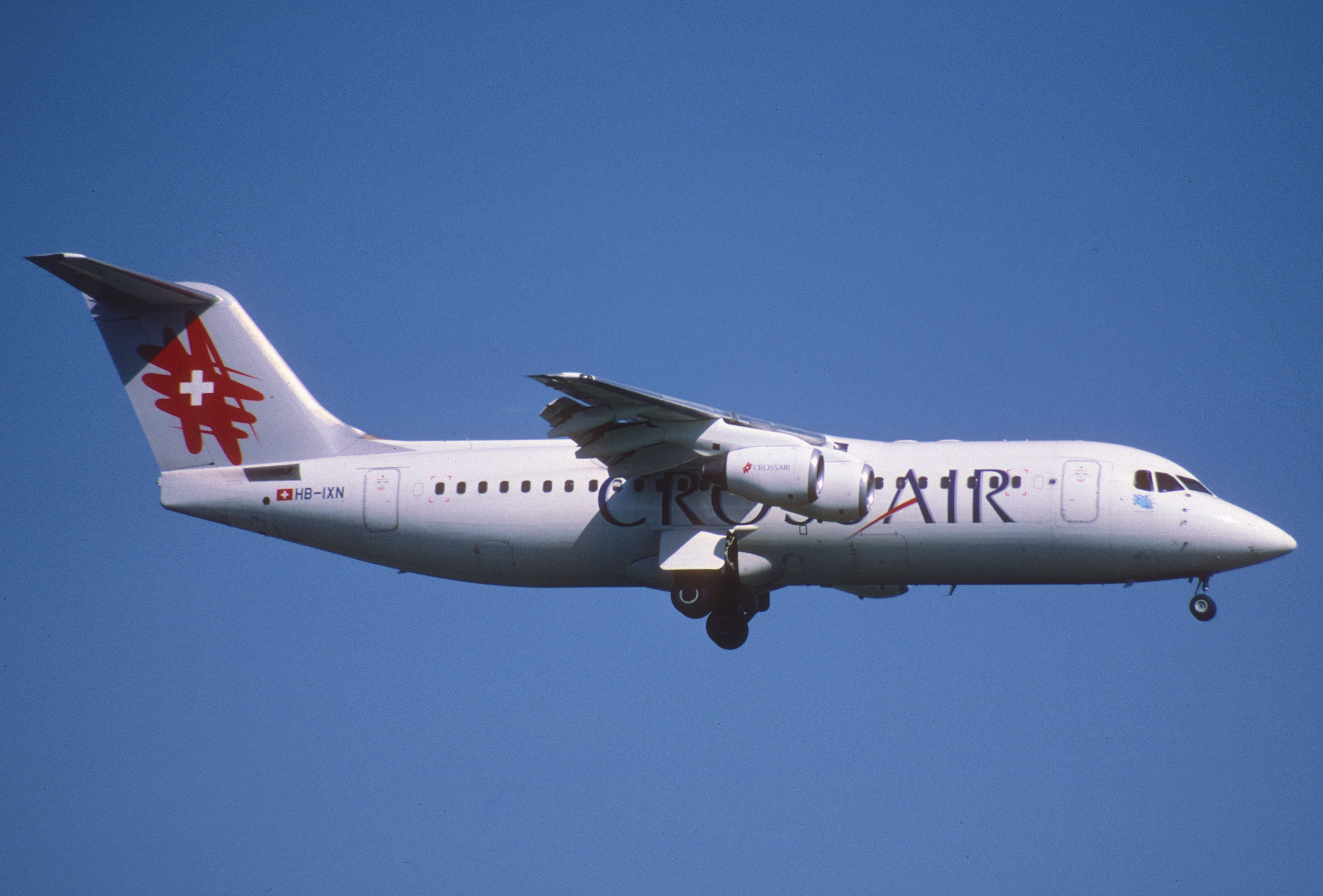 148ao - Crossair Avro RJ 100; HB-IXN@ZRH;28.09.2001